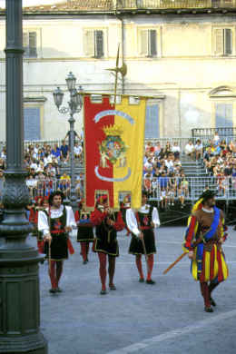 comune di cagli